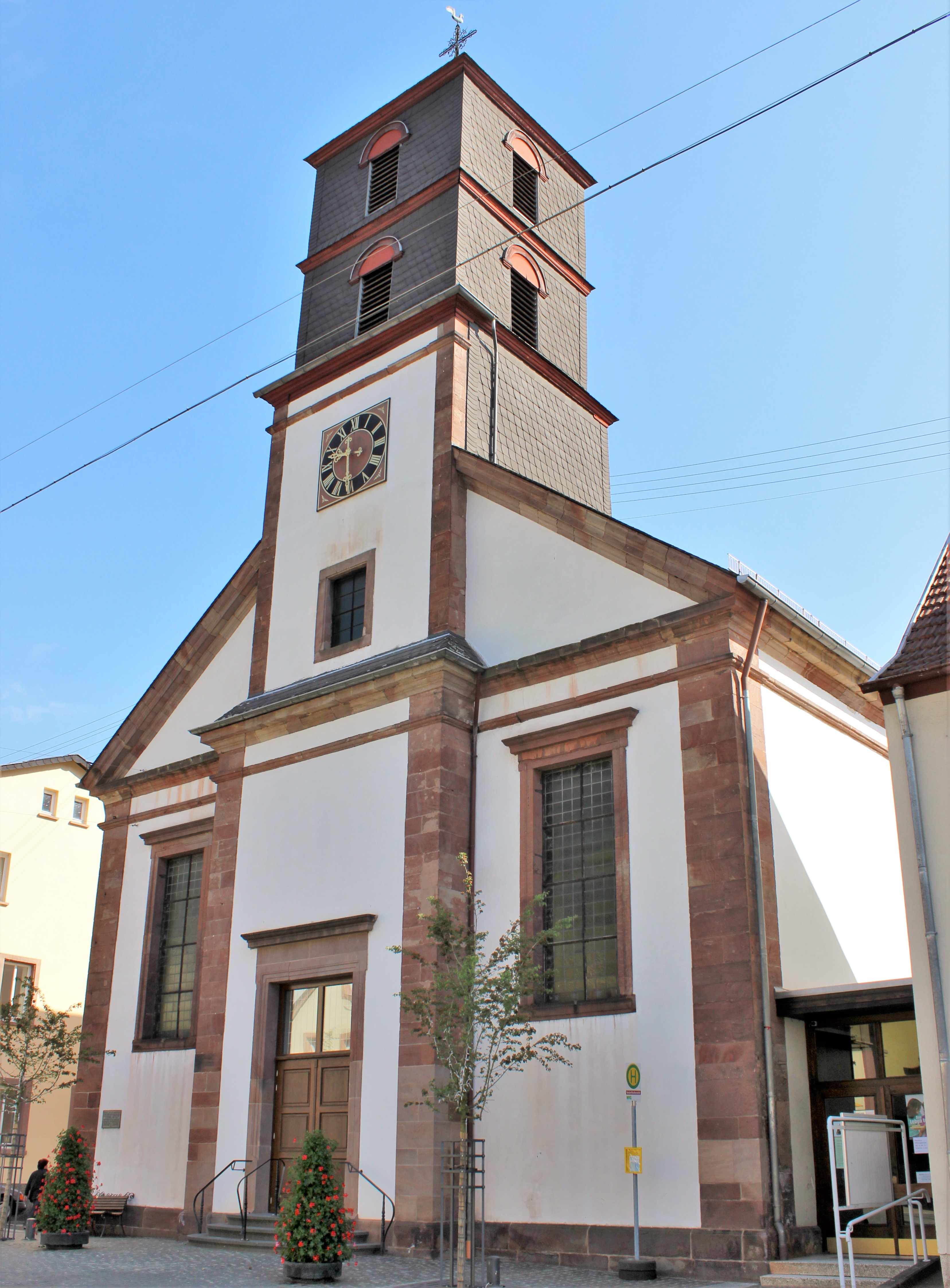 Die katholische Pfarrkirche Maria Geburt in Ottweiler, Landkreis Neunkirchen, Saarland